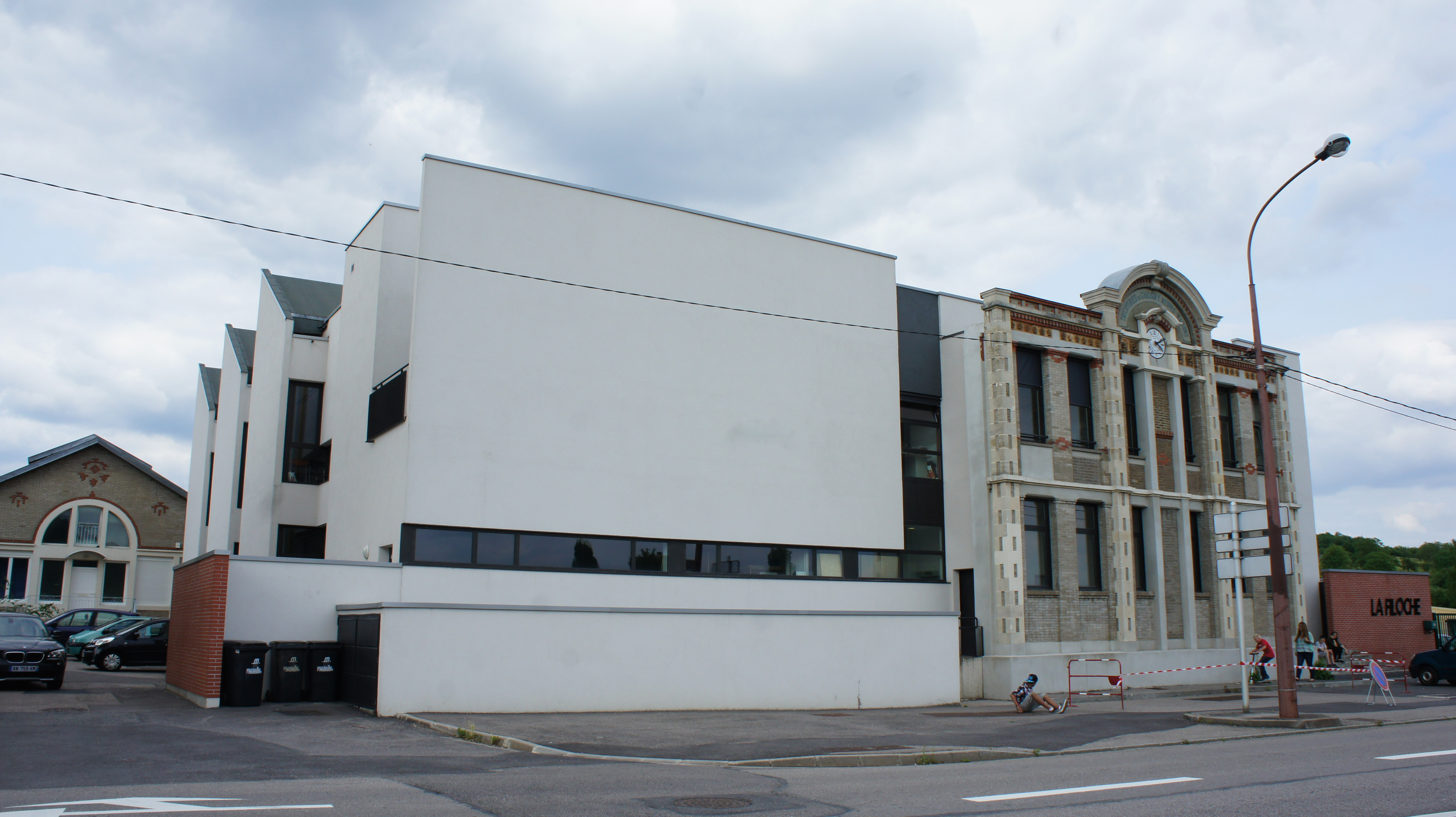 vue de l'ancienne filature, la filoche actuellement médiathèque à Chaligny .